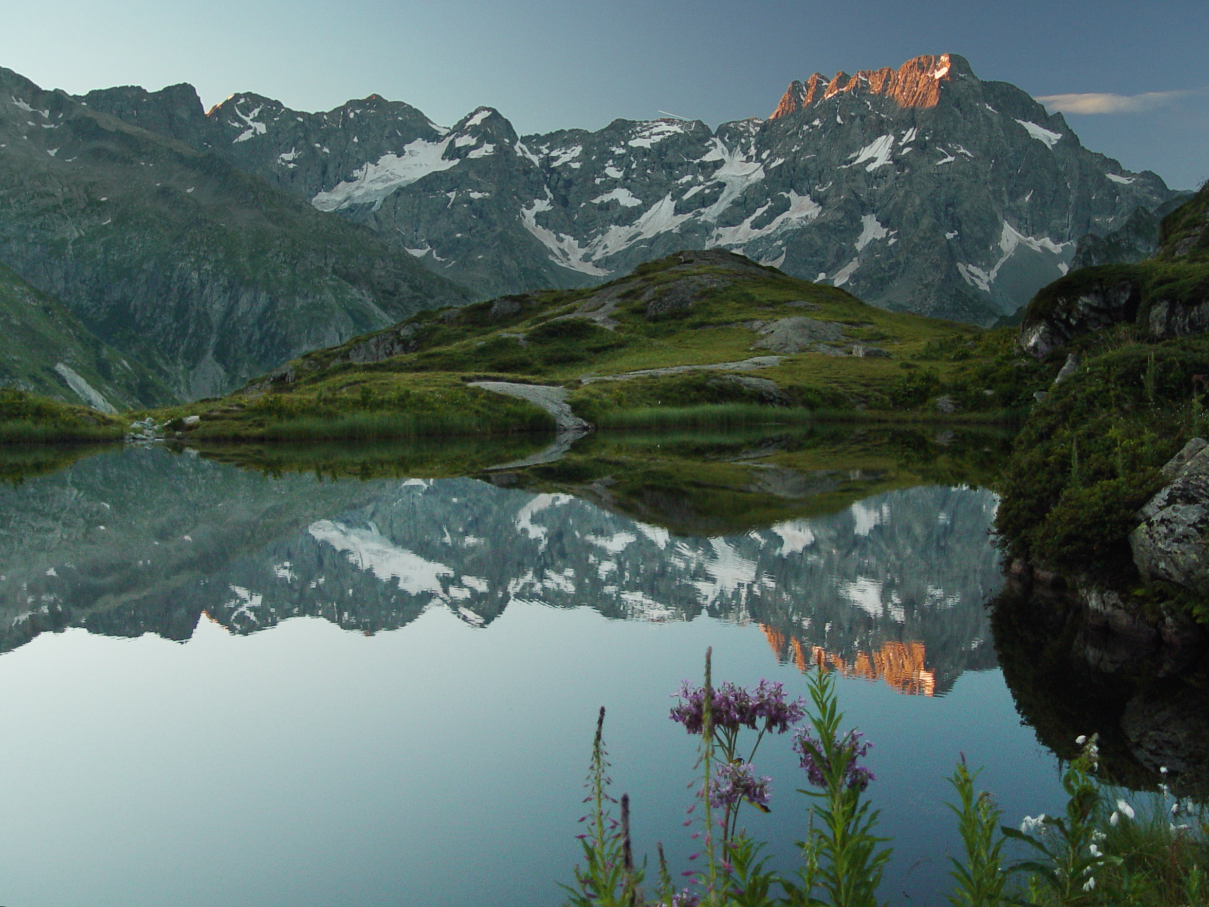 Lac du Lauzon au lever du soleil / First ray of Sun at Lake "du Lauzon""